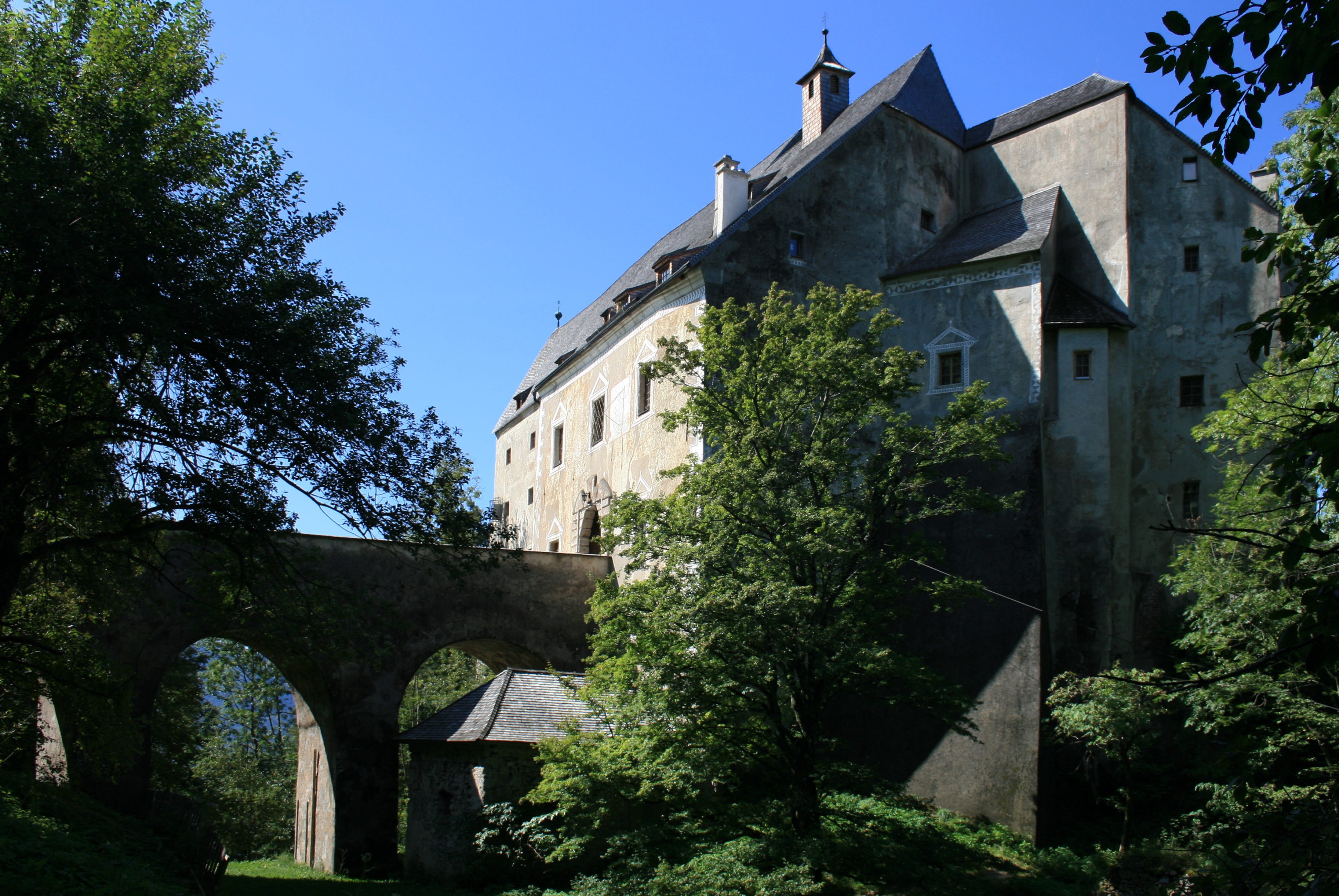 Ansicht der Burg Altpernstein in Micheldorf/Oberösterreich